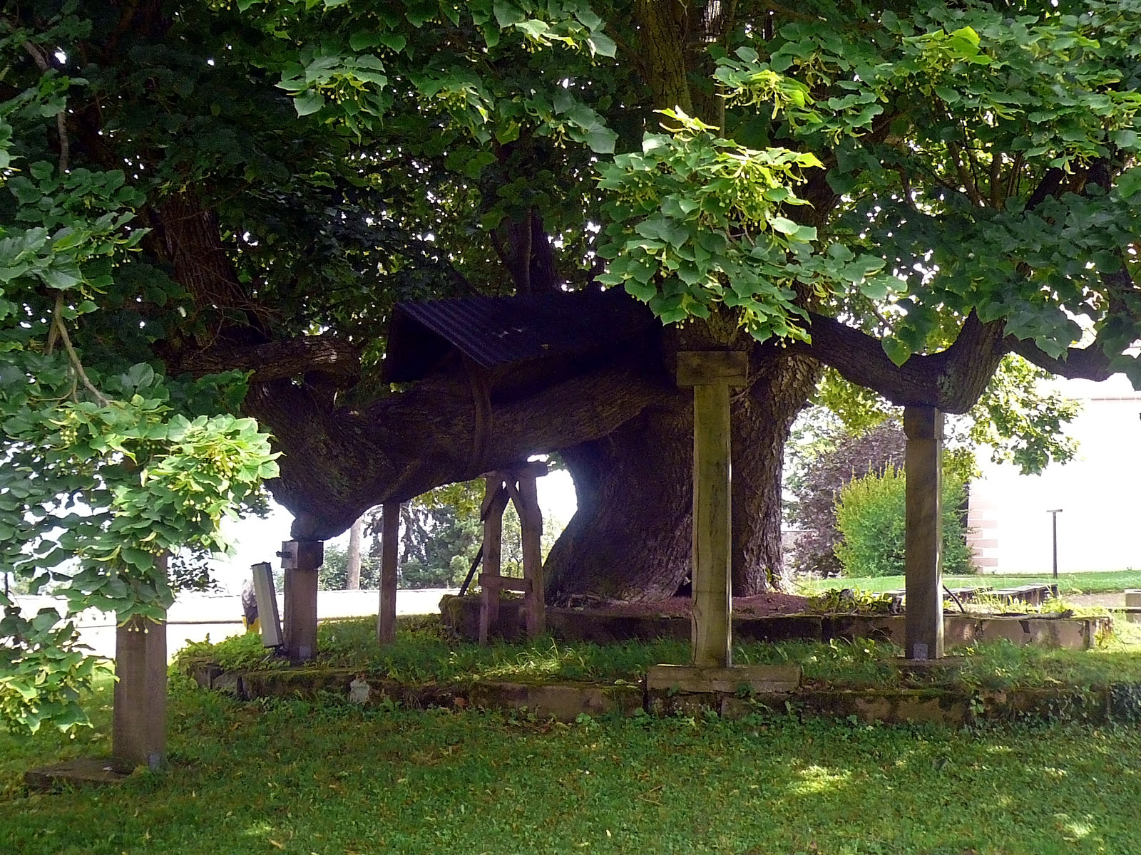 Schlosslinde Augustusburg